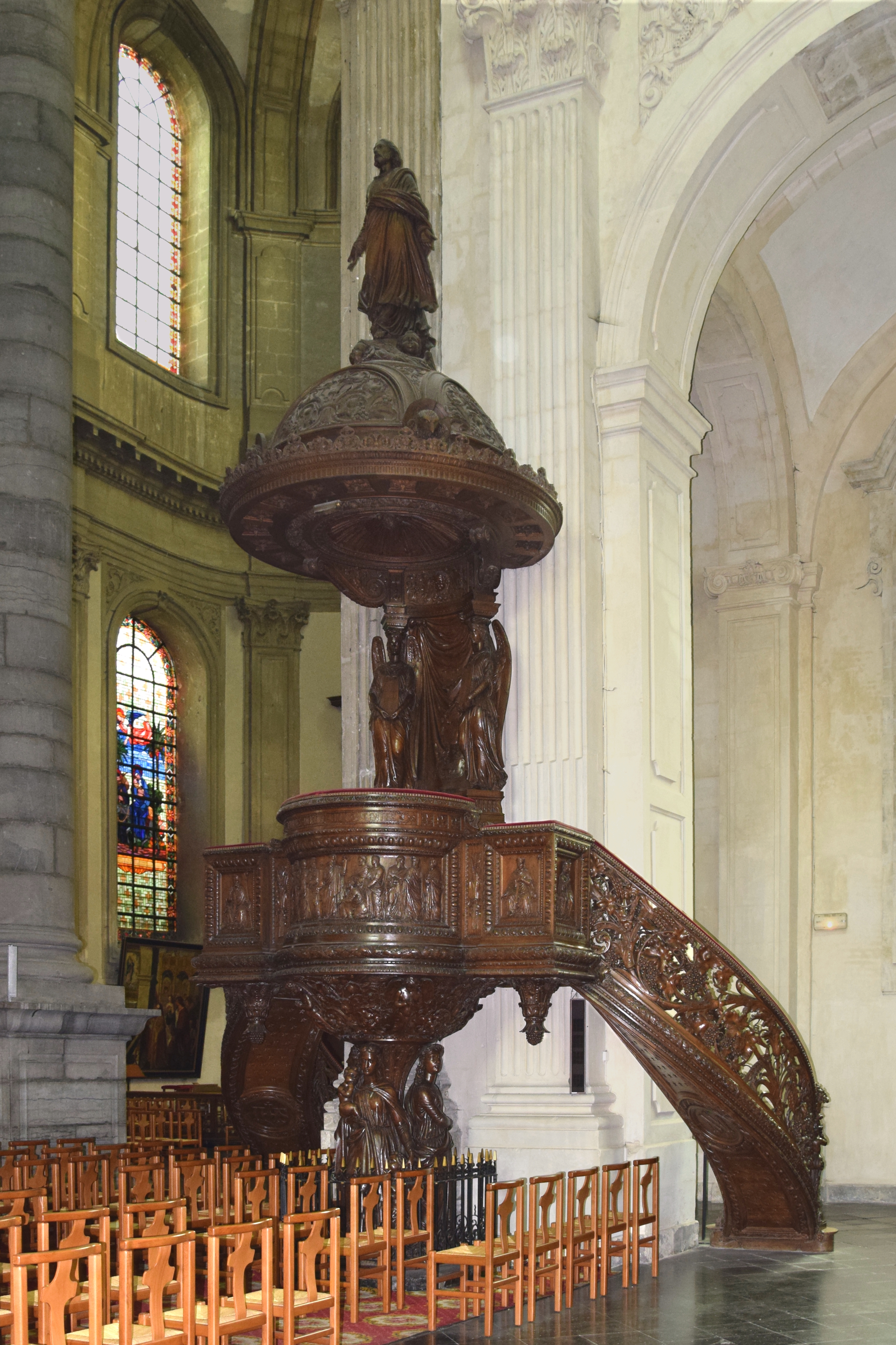 Église Saint-Géry